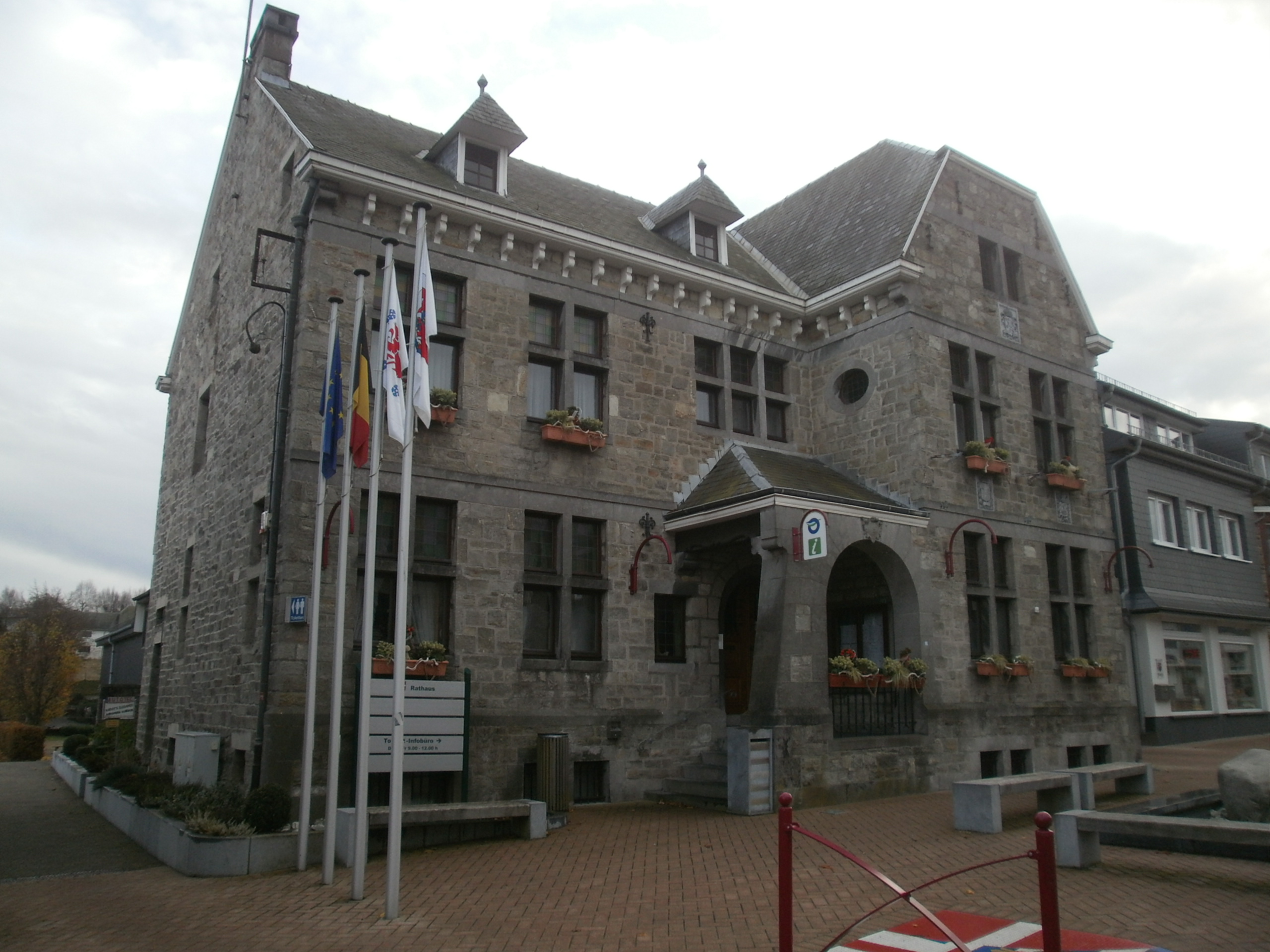 Linnakese raekoda Hauptstrasse (Peatänav) ääres. Esiplaanil loodekülg.